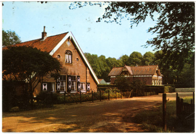 Ursulahoeve